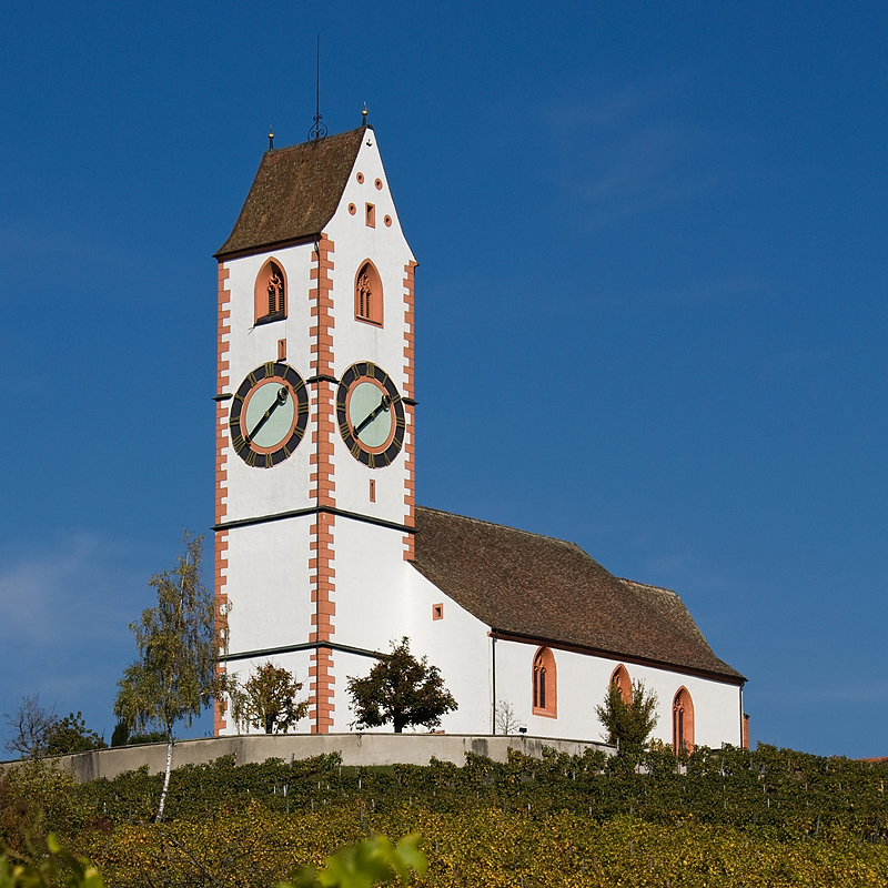 Die aus dem Jahre 1491 stammende Bergkirche St.Moritz in Hallau